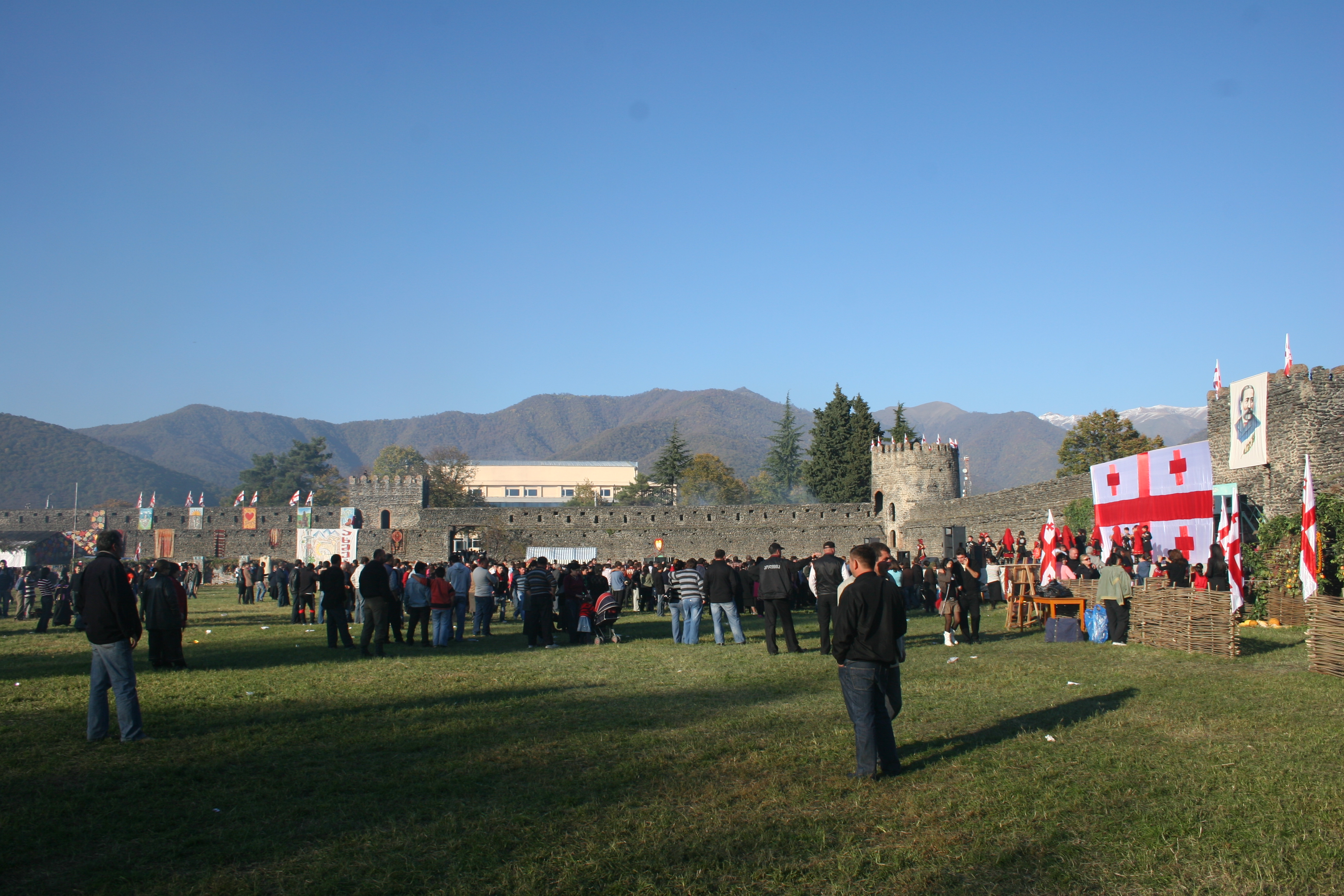 ილიაობა ყვარელში